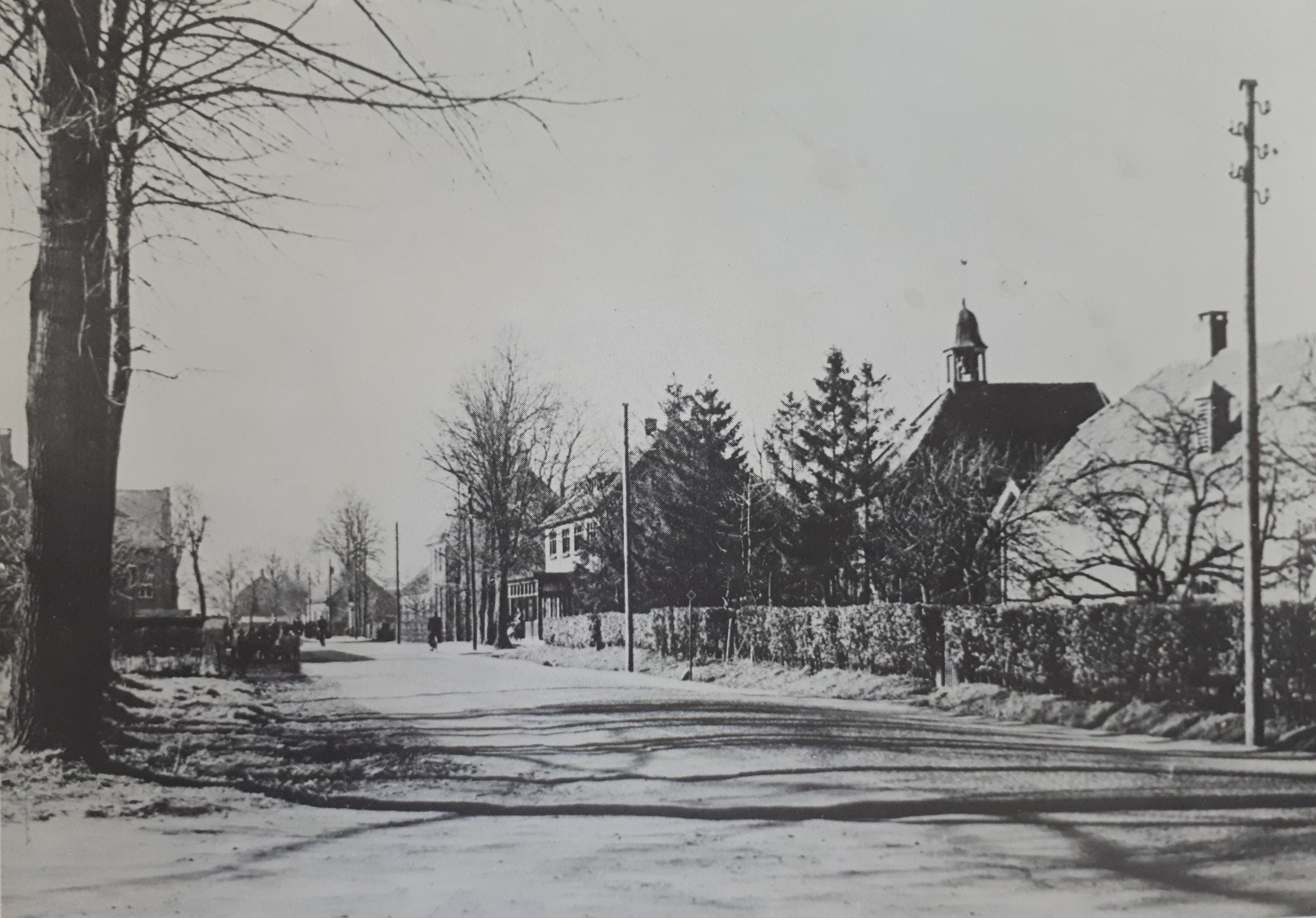 Het Kerkeneind in Hapert in de 20e eeuw.